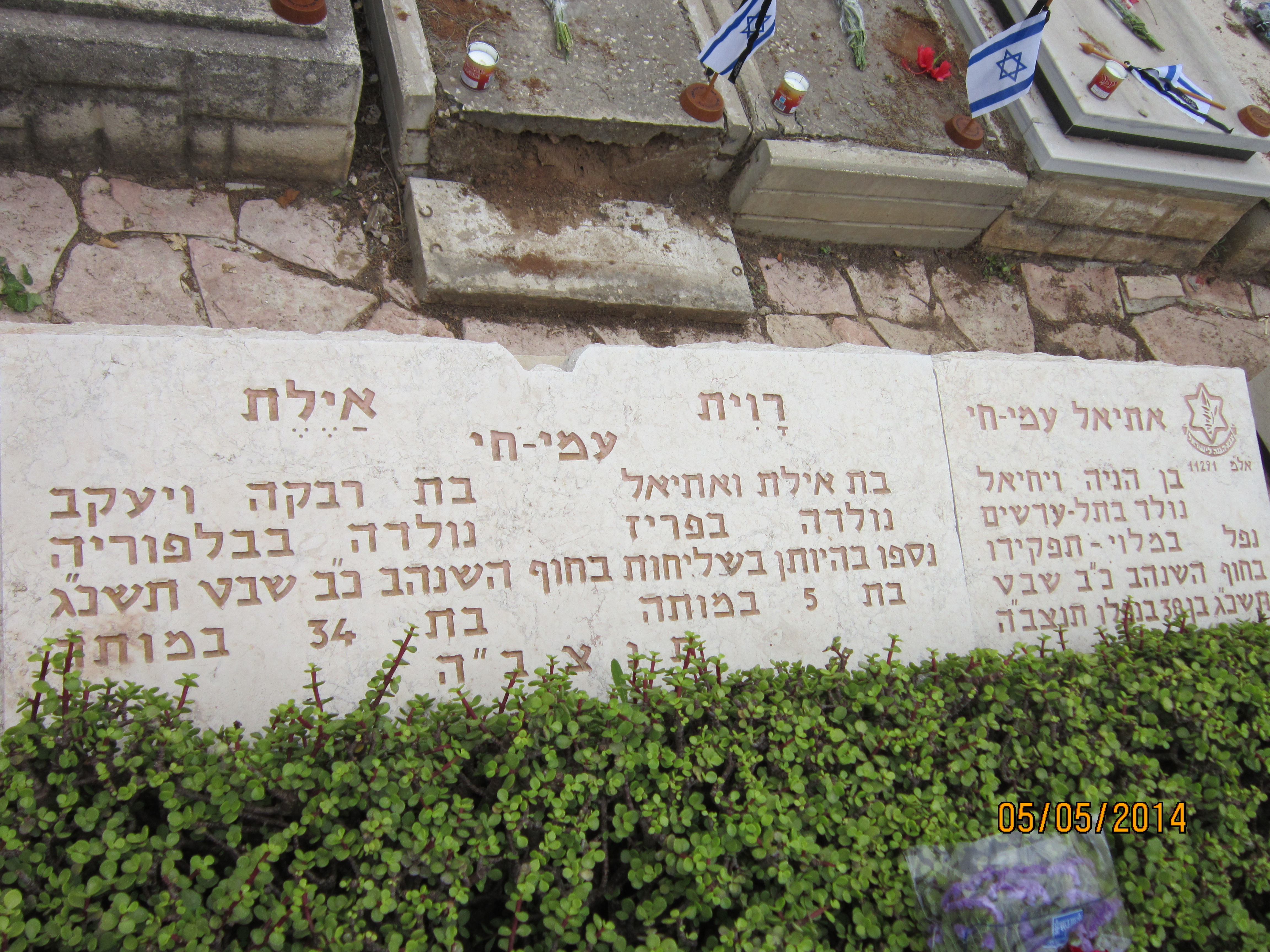 אלמ אתיאל עמ-חי = נהרג בחוף-השנהב